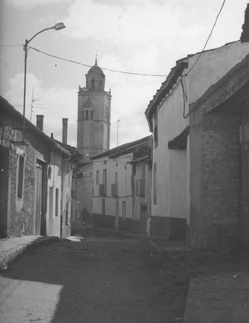 Iglesia. Torre - Ciguñuela (Valladolid) - Álbum 200 x 140 - Fotografía. Papel 105 x 75 B/N